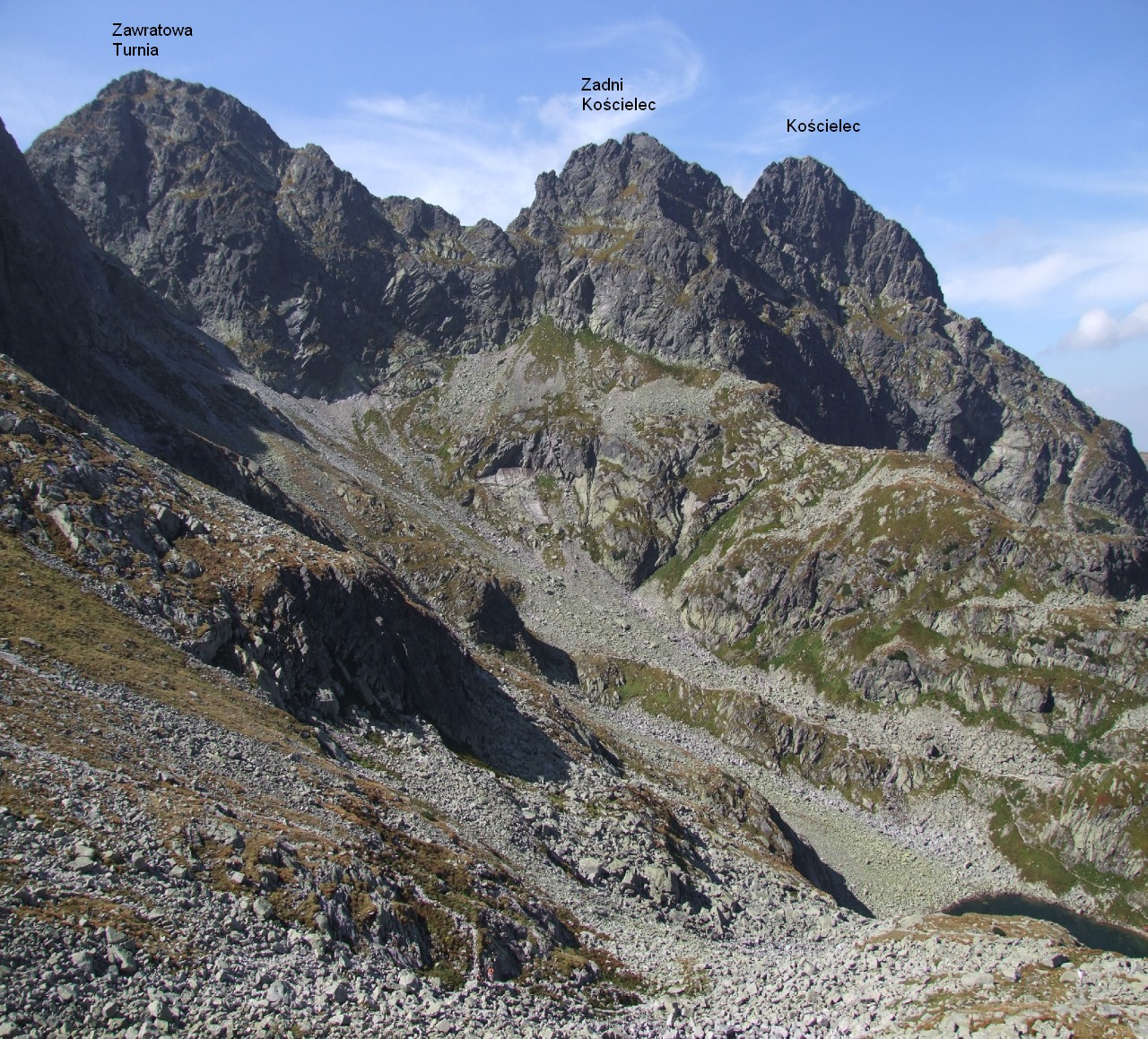 Kościelec, Zadni Kościelec, Zawratowa Turnia. Widok z Czarnych Ścian